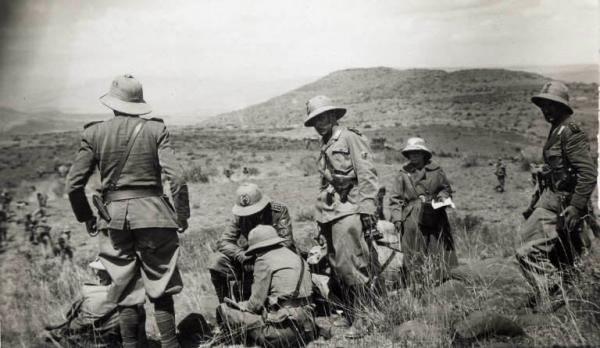 Nello scenario delle colline con scarsa e bassa vegetazione, Giuseppe Bottai osserva la carta insieme ad un altro ufficiale, intorno a loro stanno quattro militari in piedi e altri seduti.